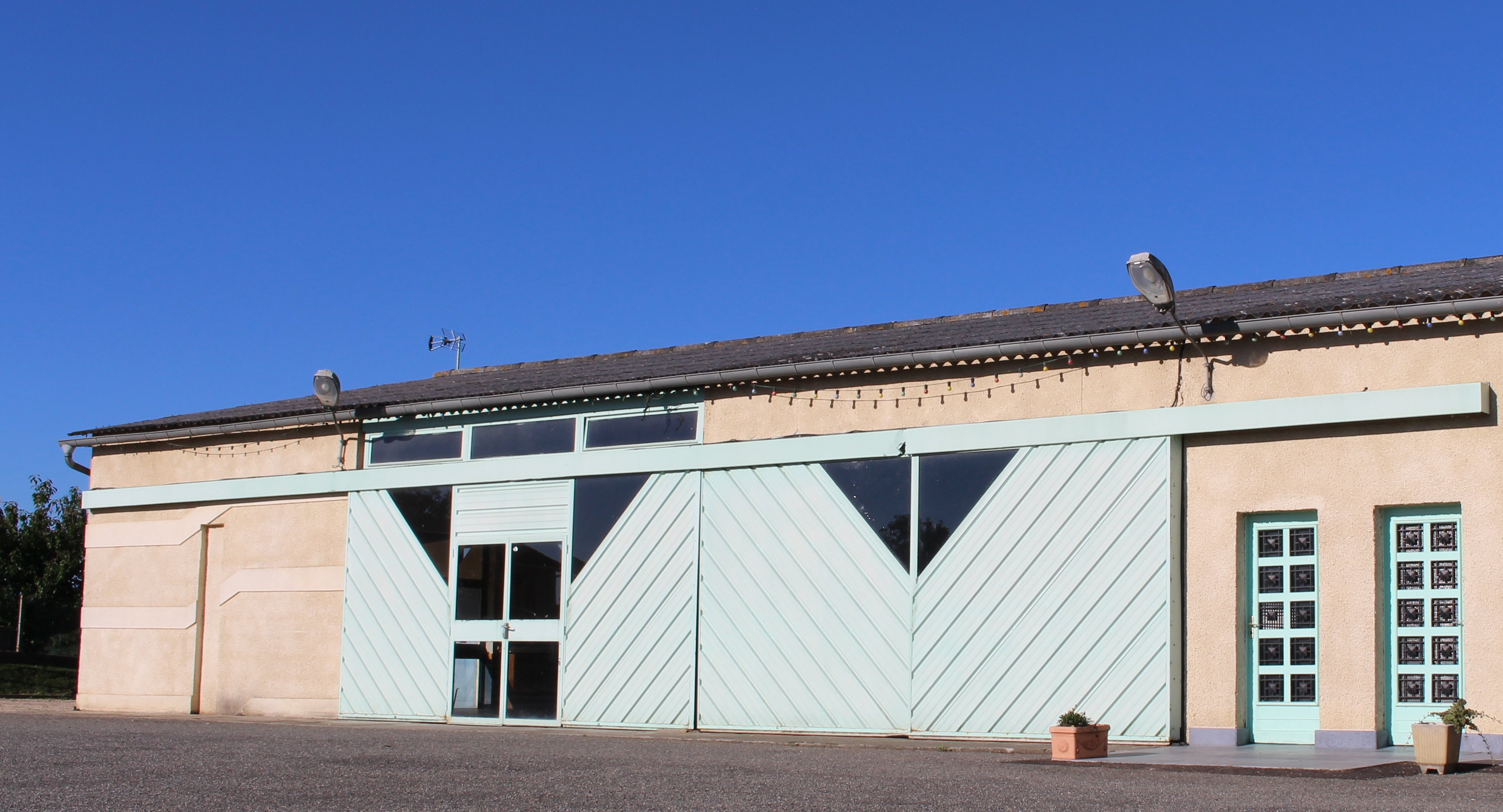 Salle des fêtes de Coussan (Hautes-Pyrénées)